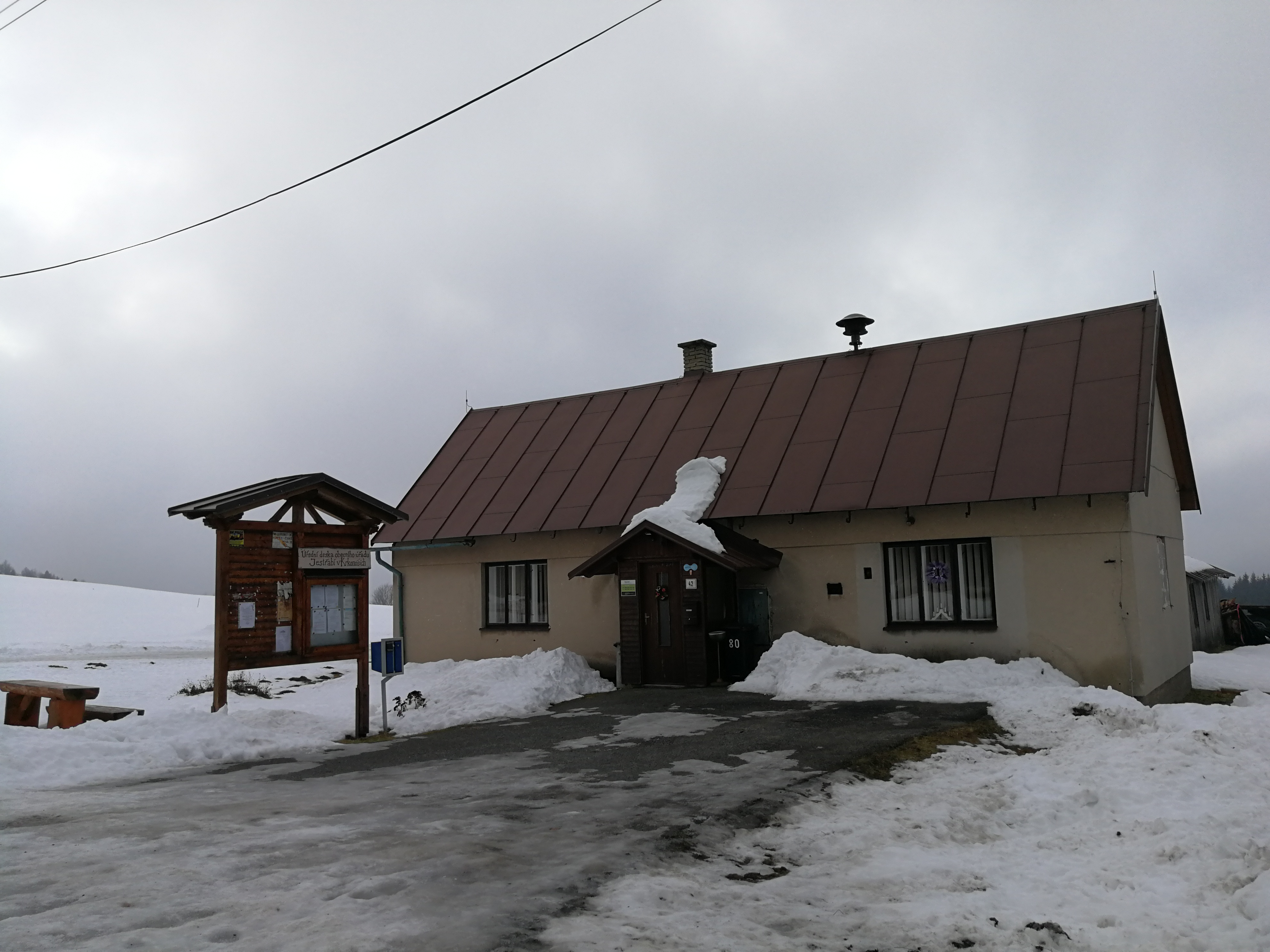 Dům. Roudnice (Jestřabí v Krkonoších).